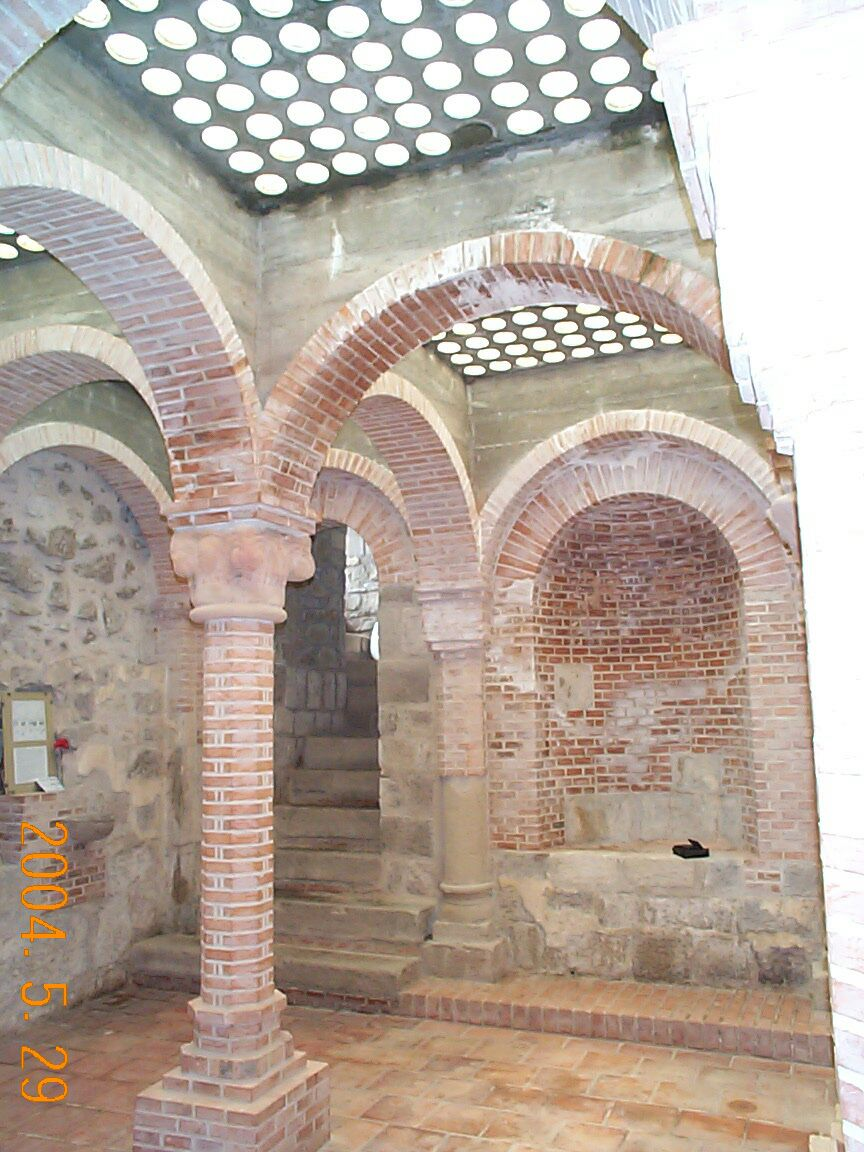 Dömös-Magyarország. A kolostor kápolnájának rekonstuált részlete. Saját felvétel This is a photo of a monument in Hungary, Identifier: 6144